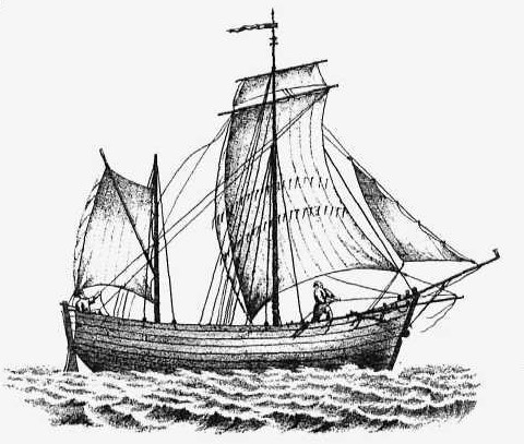 Реюшка